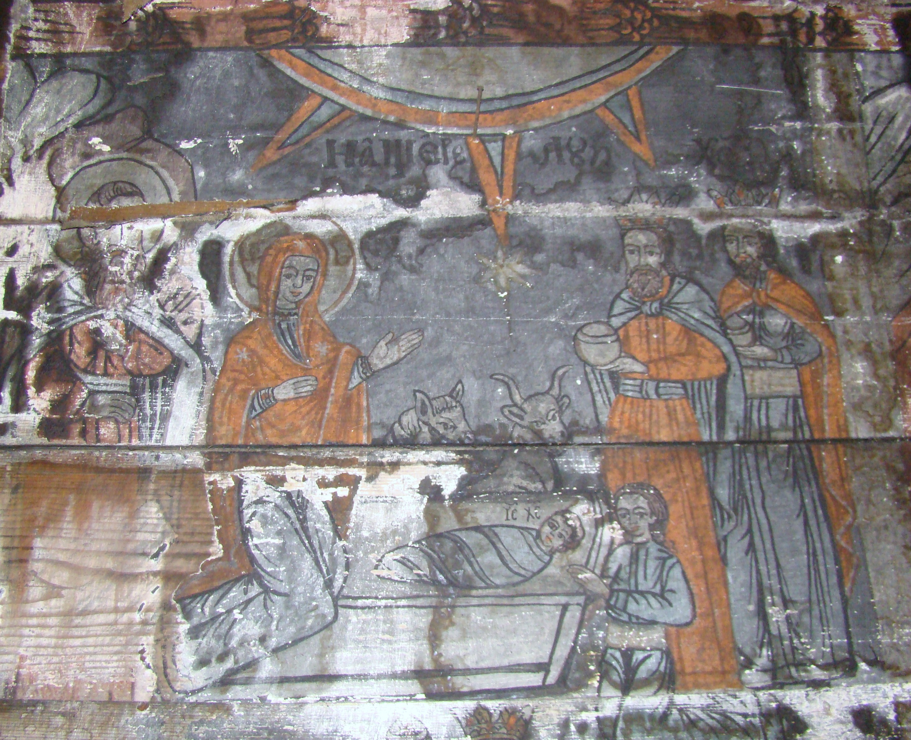 Biserica de lemn din Straja, județul Cluj